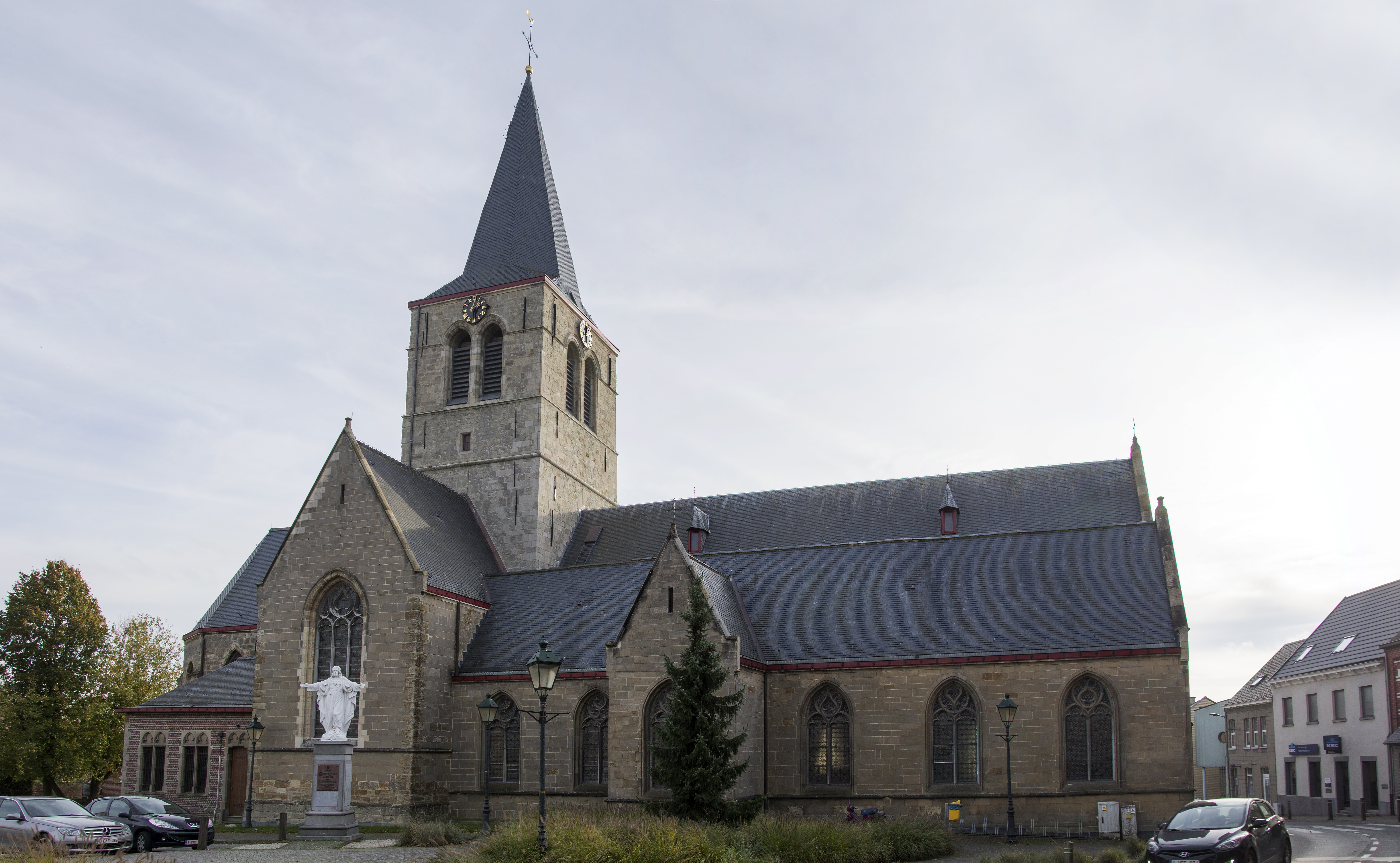 Sint-Amanduskerk Denderhoutem 16-11-2019 This photo of immovable heritage has been taken in the Flemish Region